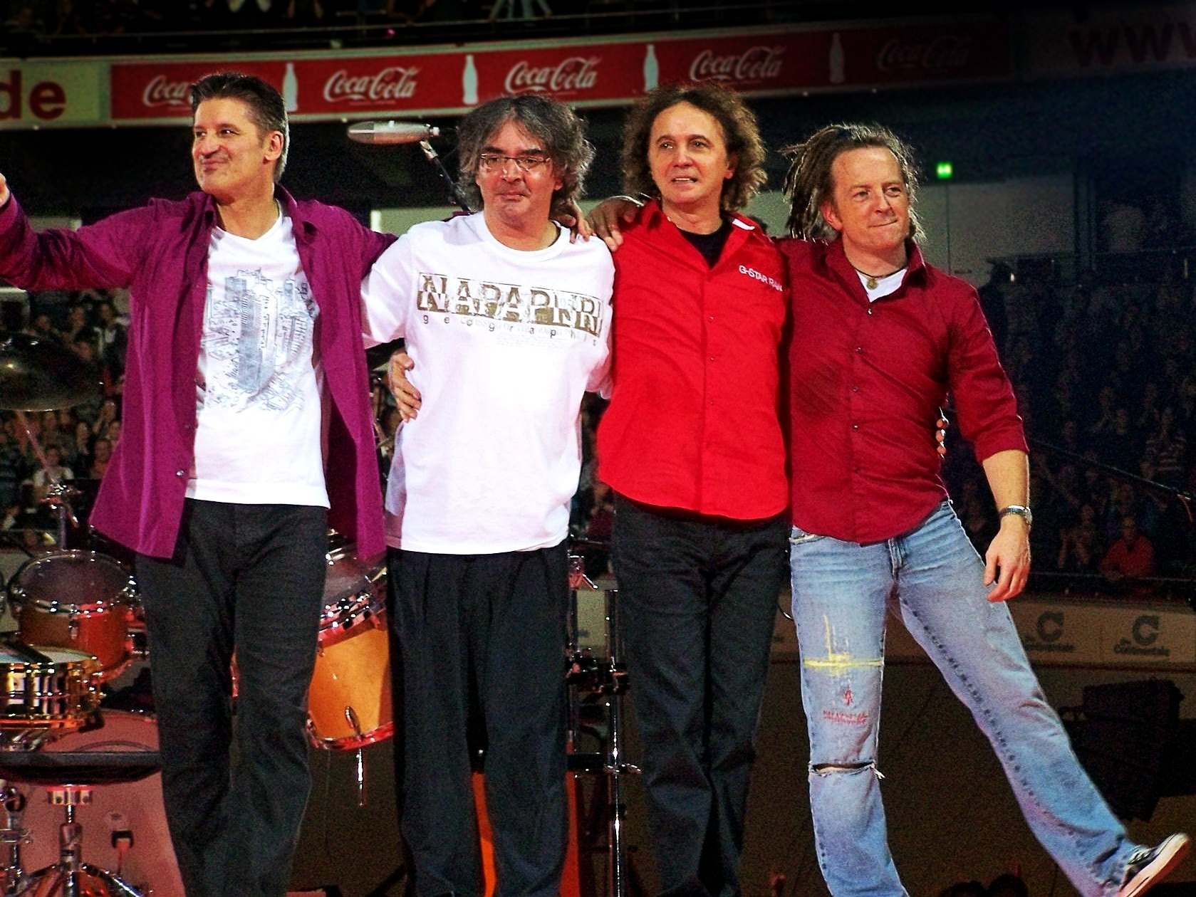 Pur während eines Konzerts in Dortmund im Dezember 2009